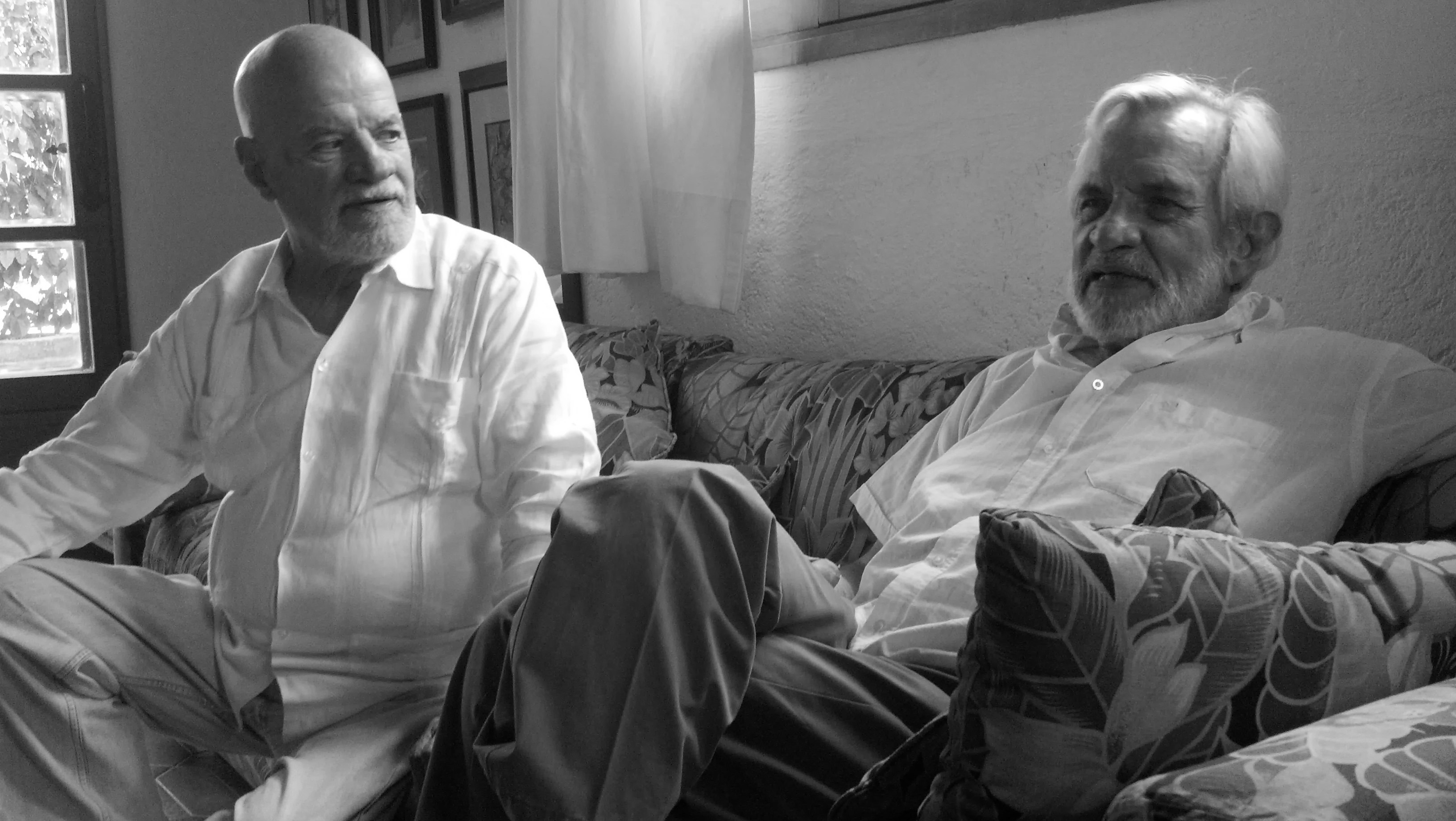 Rodrigo Moya y Guillermo Angulo. Cuernavaca, Morelos, México. 23 abril 2014